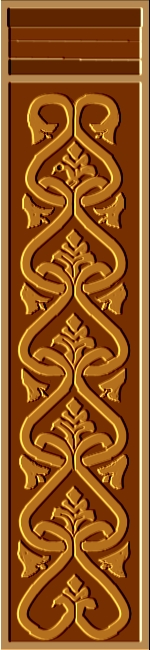 Panneau de bois sculpté, pavillon privé, Holmenkollen, Oslo.